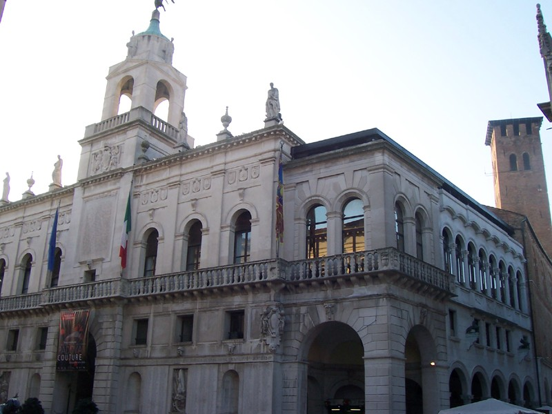 Padova - Municipio